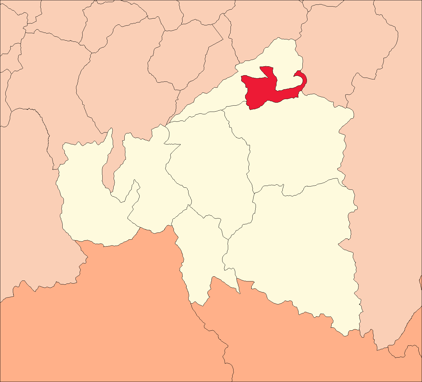 Área del distrito de Tomay Kichwa.